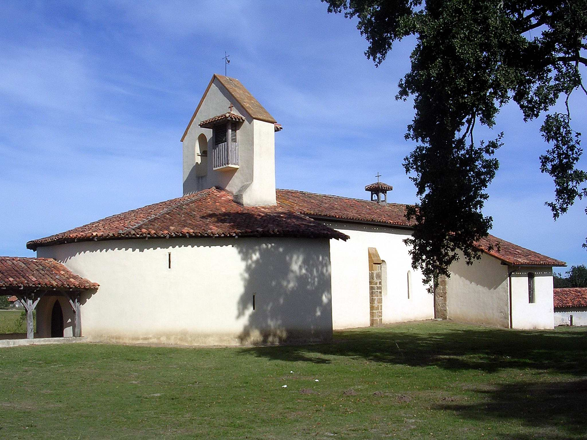 Église Saint-Jean-Baptiste de Suzan, à Ousse-Suzan, dans le département français des Landes